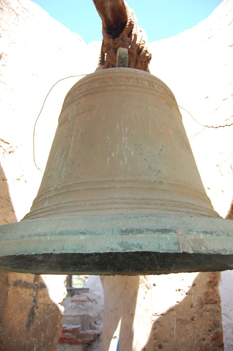 Campana de bronce del siglo XVIII, Iglesia de San Javier, Nasca, Perú.